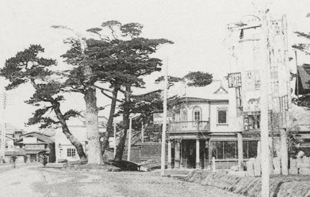 明治後期頃の秋田市広小路「疋田邸の三本松」